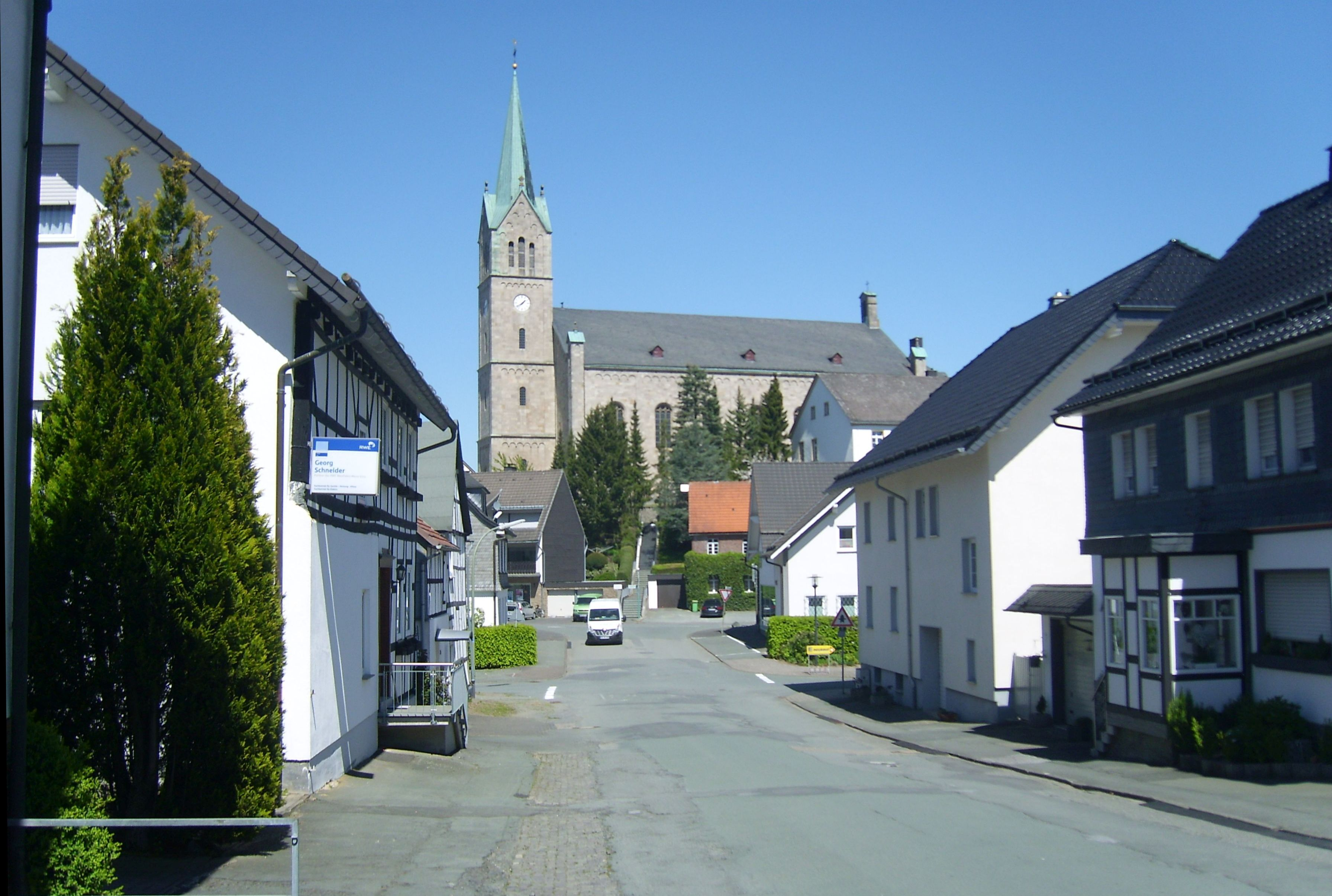 St. Peter und Paul in Medebach von Süden